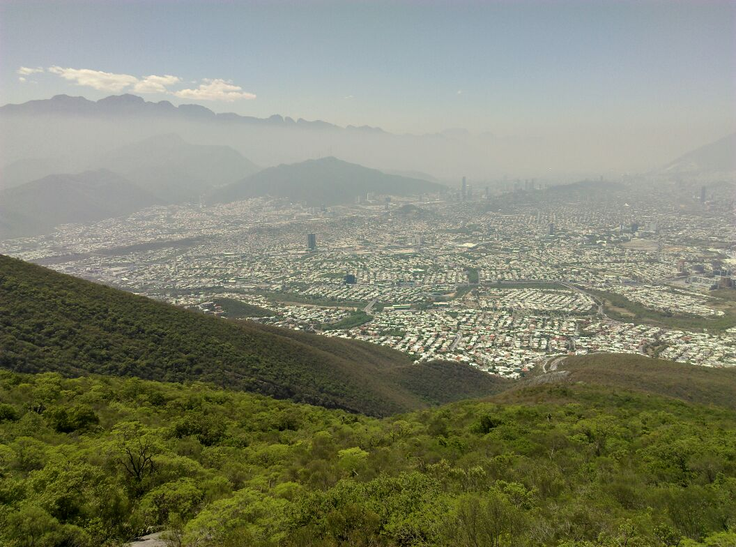 Vista desde el techo de la antigua plataforma del teleferico en el Cerro de la Silla, en Nuevo Leon.